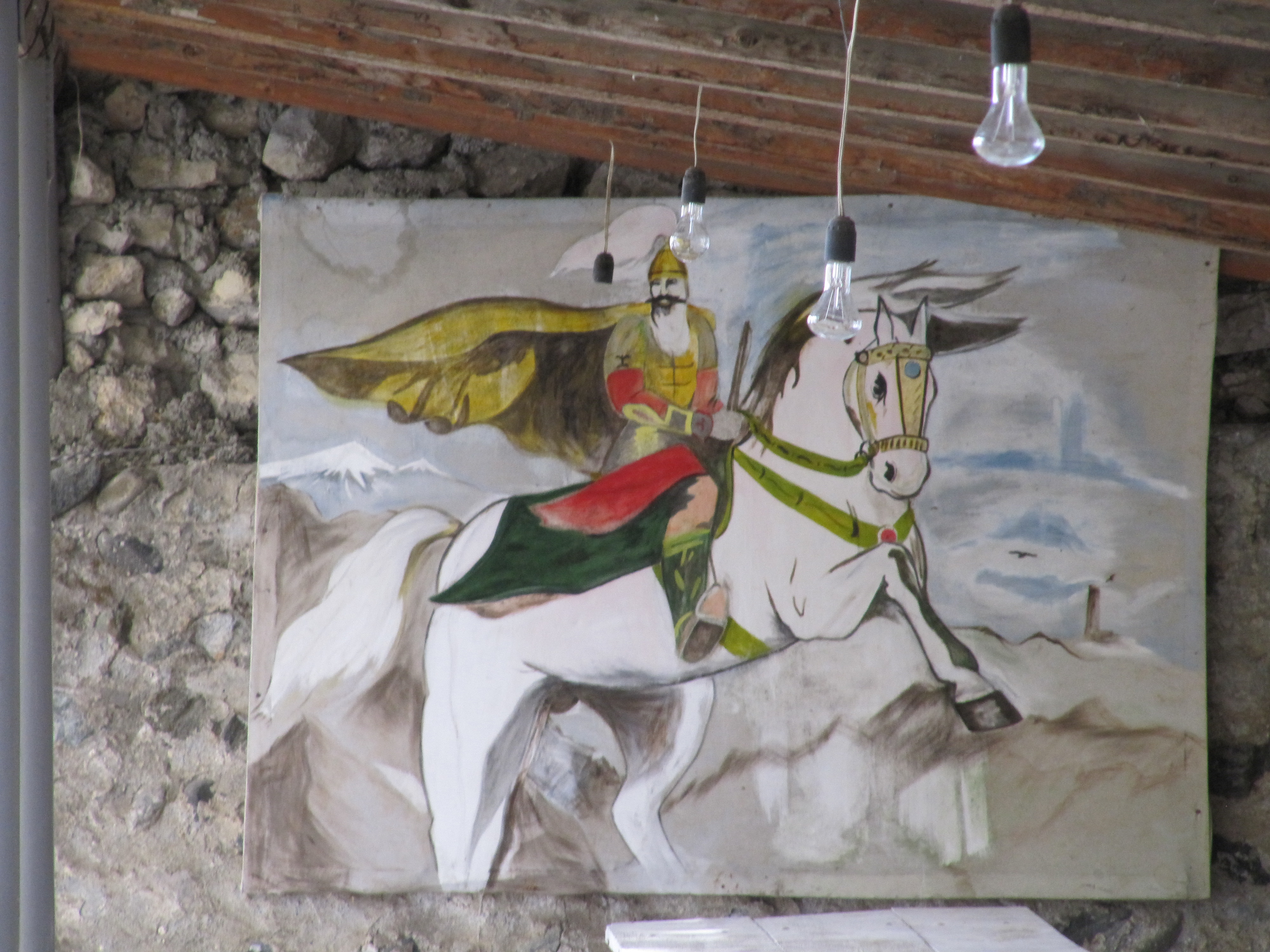 Уастырджи